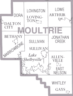 Moultrie County Illinois